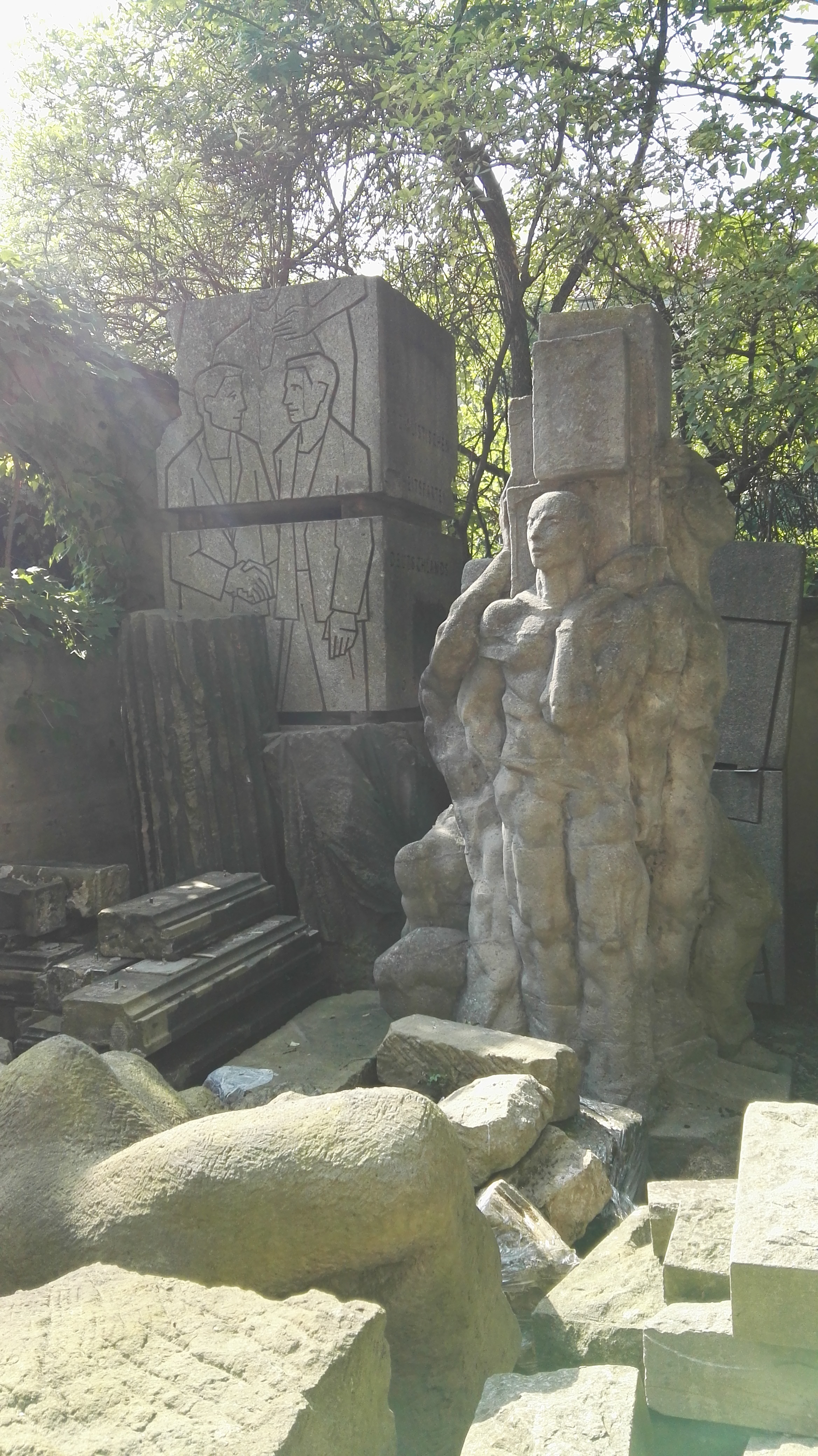 Lapidarium in der Alten Zionskirche in Dresden-Südvorstadt: die Plastik (Einheitsdenkmal) im Hintergrund befand sich früher am Ullersdorfer Platz (Siegfried-Rädel-Platz); die Plastik im Vordergrund auf der Ferdinandsplatz